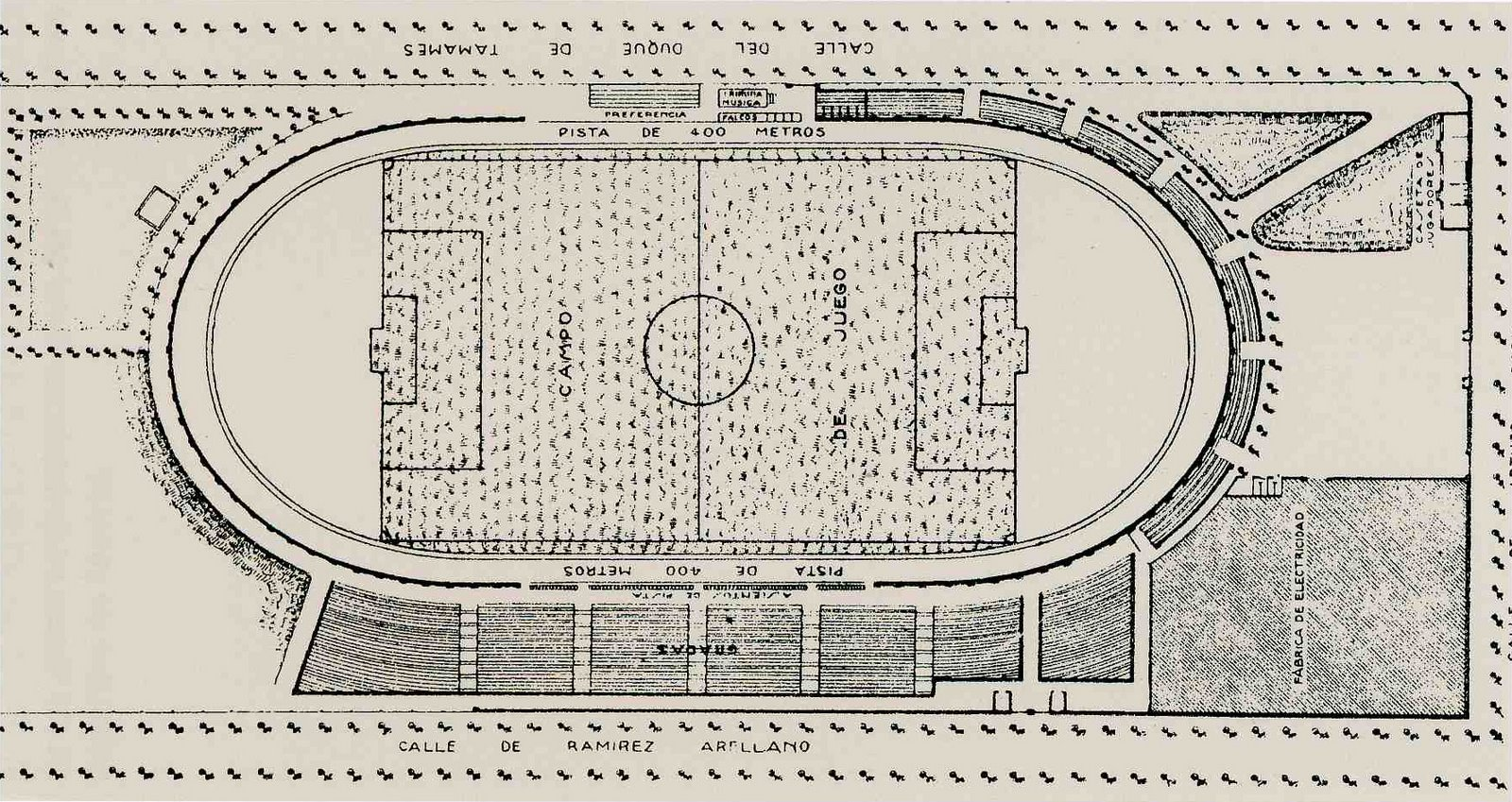 Velódromo de la Ciudad Lineal; planificación y dibujos publicados en la revista de urbanismo de la Compañía Madrileña de Urbanización.